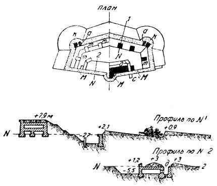 Типовой проект "Укрепление №2"